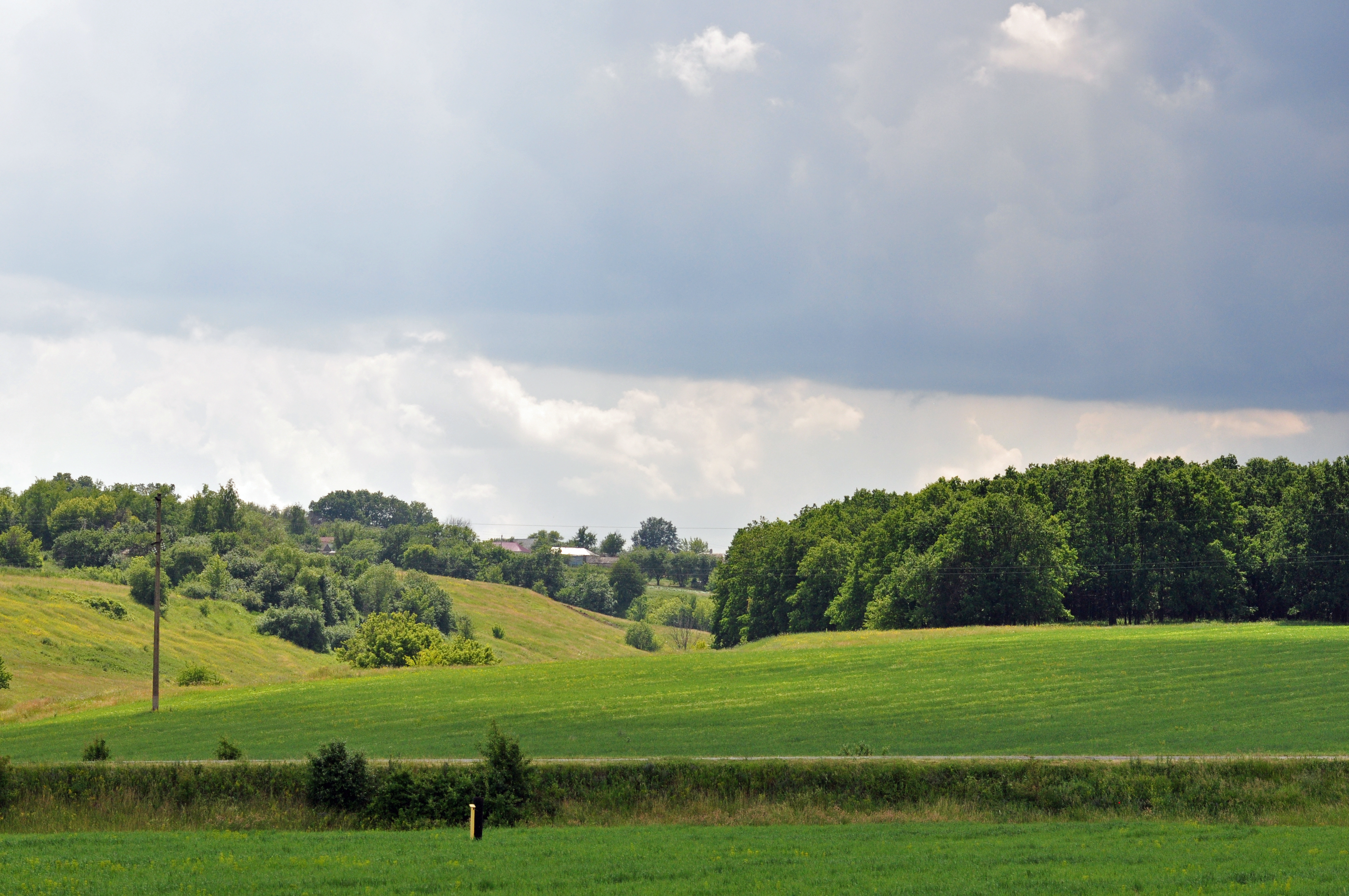 Липецкая область